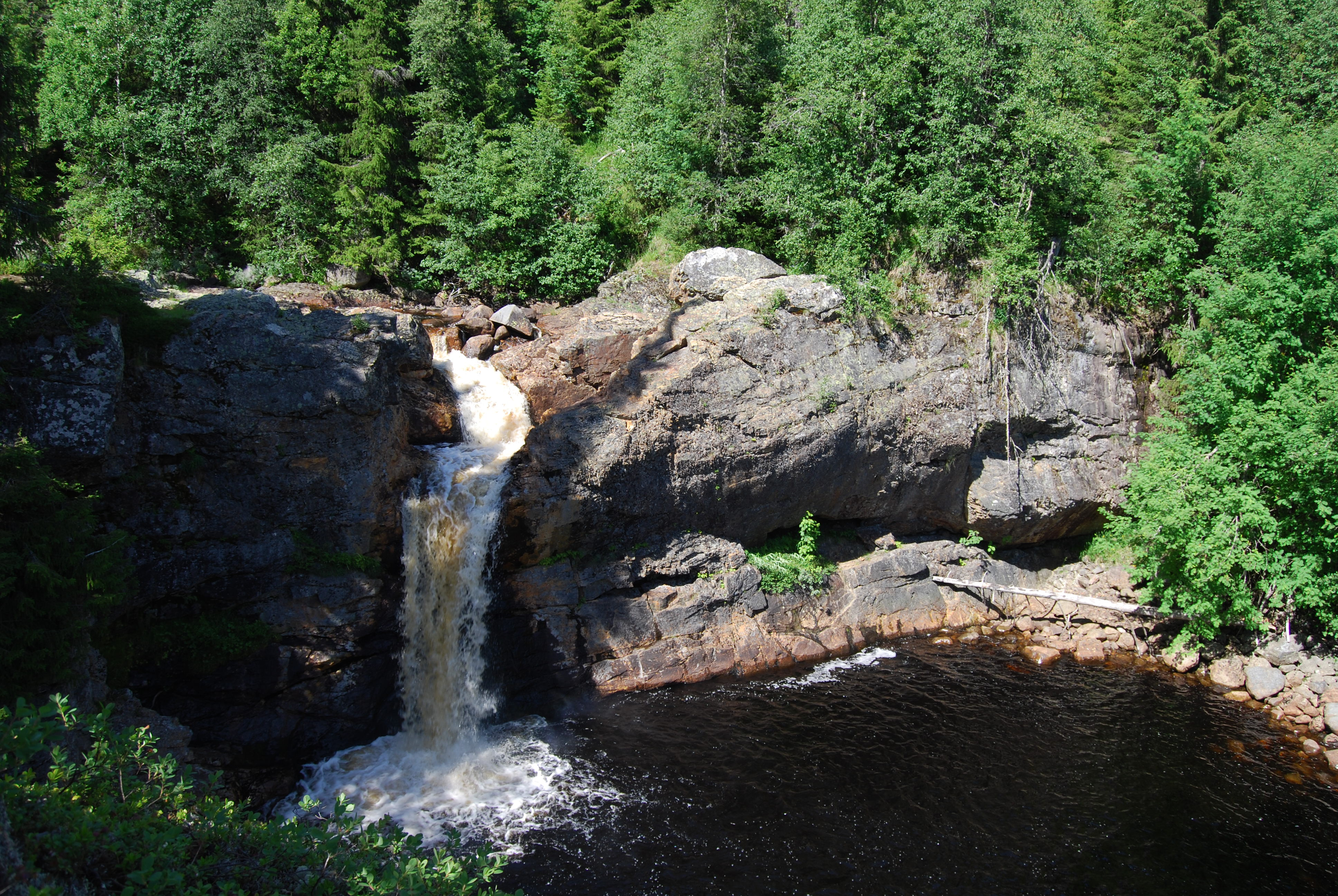 Fossefall på Tørbustilen.